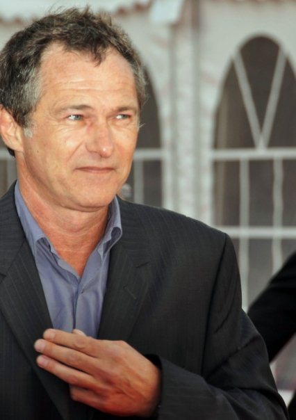 Bruno Wolkowitch au festival de Deauville